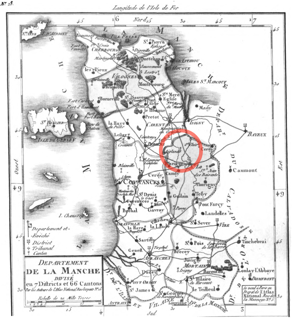 Localisation de l'ancien canton d'Esglandes sur la carte du nouveau département de la Manche en 1792.